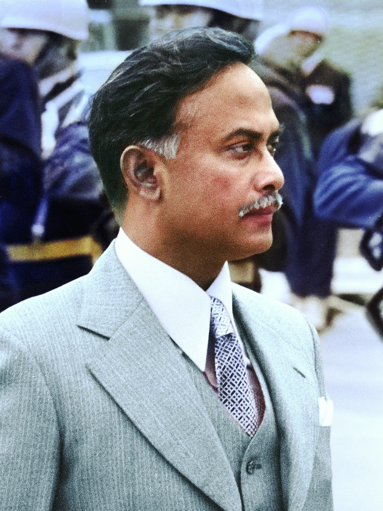 Aankomst op Schiphol; Hare Majesteit en president Ziaur Rahman